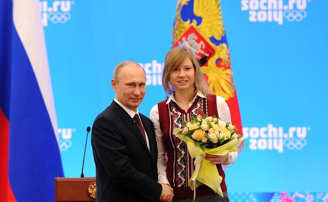 Медалью ордена «За заслуги перед Отечеством» первой степени награждена серебряный призёр Олимпийских игр в скоростном беге на коньках Ольга Фаткулина.